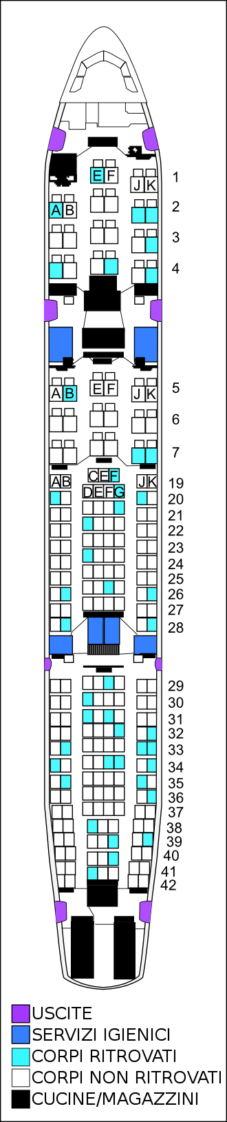 Traduzione